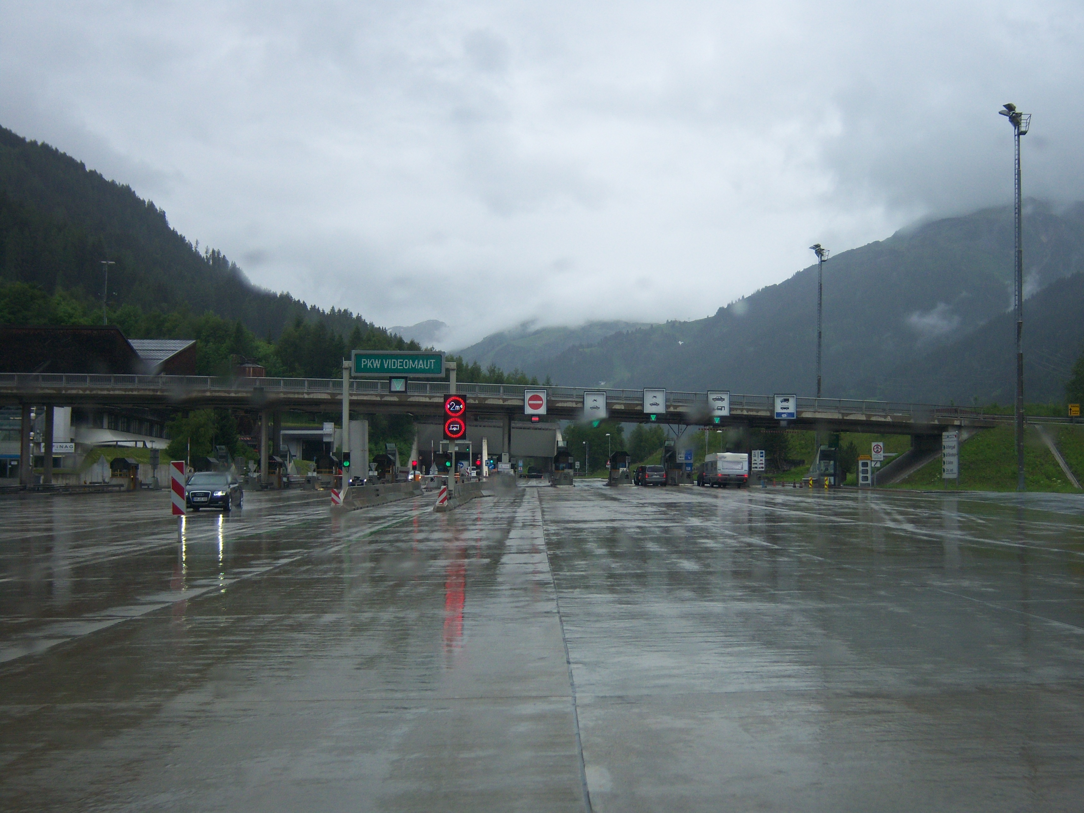 Arlberg Schnellstraße S16 Richtung Bregenz vor der Mautstelle St. Jakob